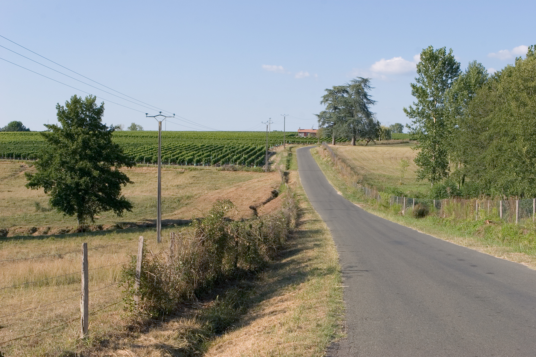 Village et vignoble, Sauternes, France.